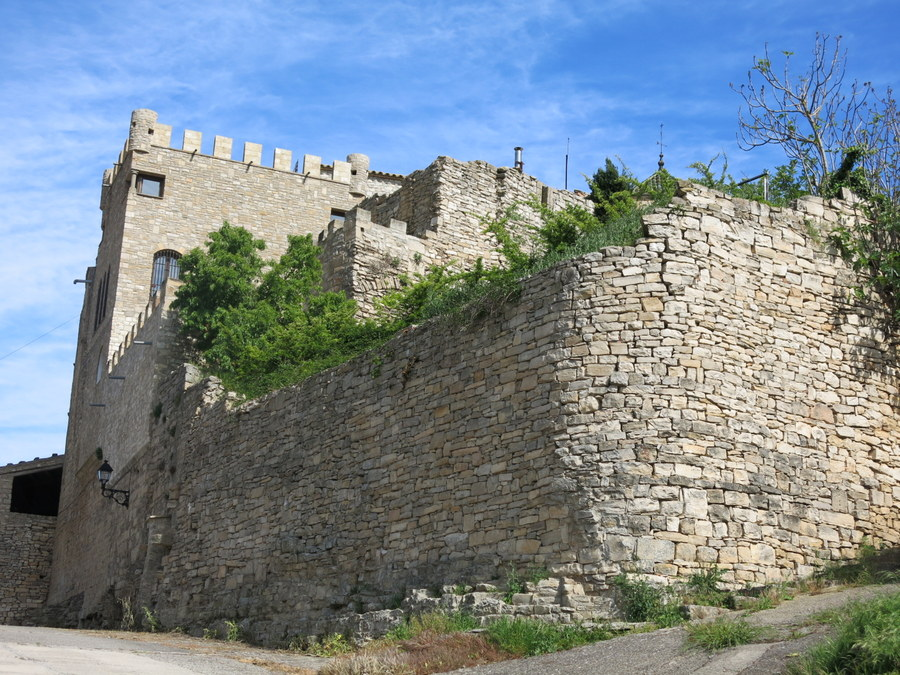 castell de Vallfogona de Riucorb, comarca de Conca de Barberà, Catalunya